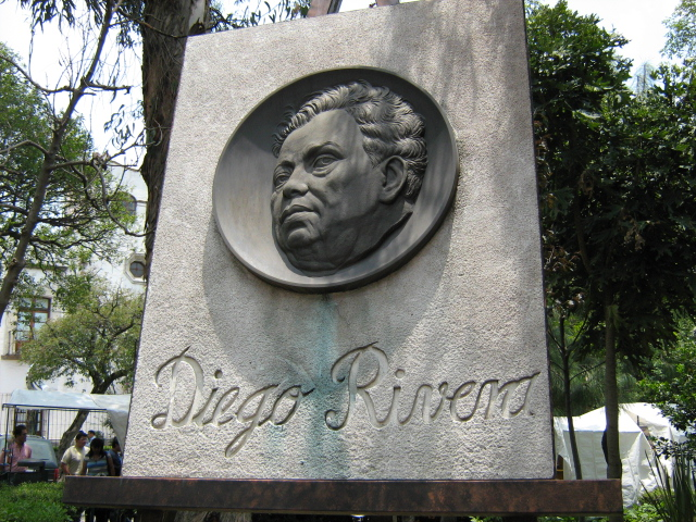 Bajorrelieve en memoria de Diego Rivera en la Plaza de San Jacinto, México, D. F.